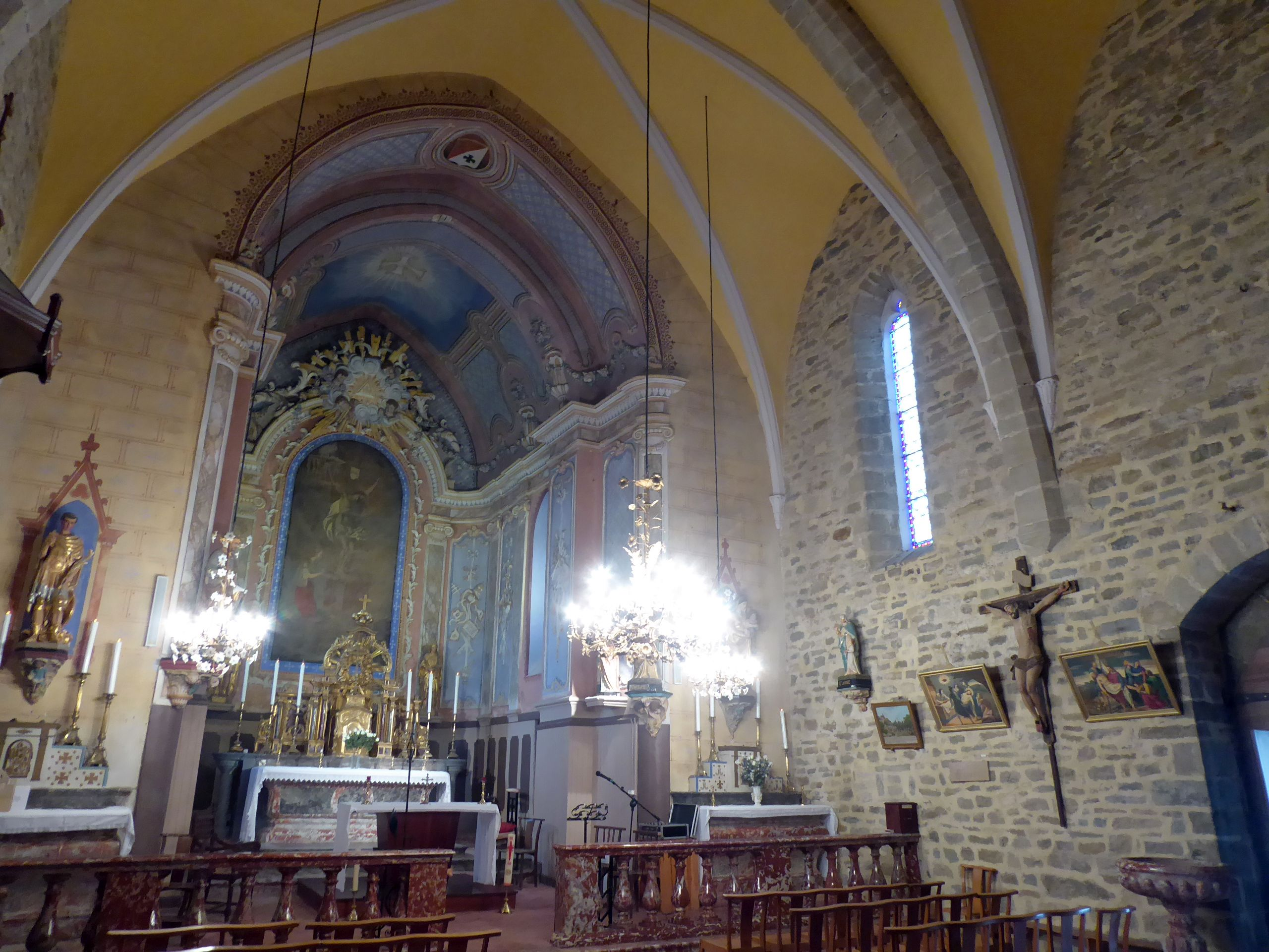 Église Saint-Julien-et-Sainte-Basilisse de Magrie (01)